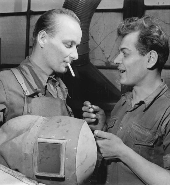 VEB Bodenbearbeitungsgeräte Leipzig, griechische Arbeiter Zentralbild Schaar 3077.A.-V. 29.12.1959 Mit guten Verpflichtungen ins neue Planjahr Die Mitglieder der Brigade "Manolis Glezos" aus dem VEB Bodenbearbeitungsgeräte Leipzig haben sich das Ziel gestellt, im neuen Planjahr bis zum 8. Mai drei Tage, bis zum 7.10. - sieben Tage undbis zum 18.12. elf Tage Planvorsrung zu erarbeiten. Sie wollen ausserdem bis 1961 für alle Produkte die Güteklasse "1" erringen. Um das gemeinsame Ziel für 1960, die Erringung des Titels "Betrieb des sozialistischen Arbeit" zu erreichen, fordert die Brigade einen bis ins kleinste aufgeschlüsselten Brigadeplan mit genauer Angabe der menge, Stückzahl, Minuten, Material- und Lohnkosten, um Fehlplanungen auszuschalten. UBz: Der griechische Brigadier Stefanos Pliakatras (rechts) und der Schweißer Lothar Nothoff während einer kurzen Arbeitspause.